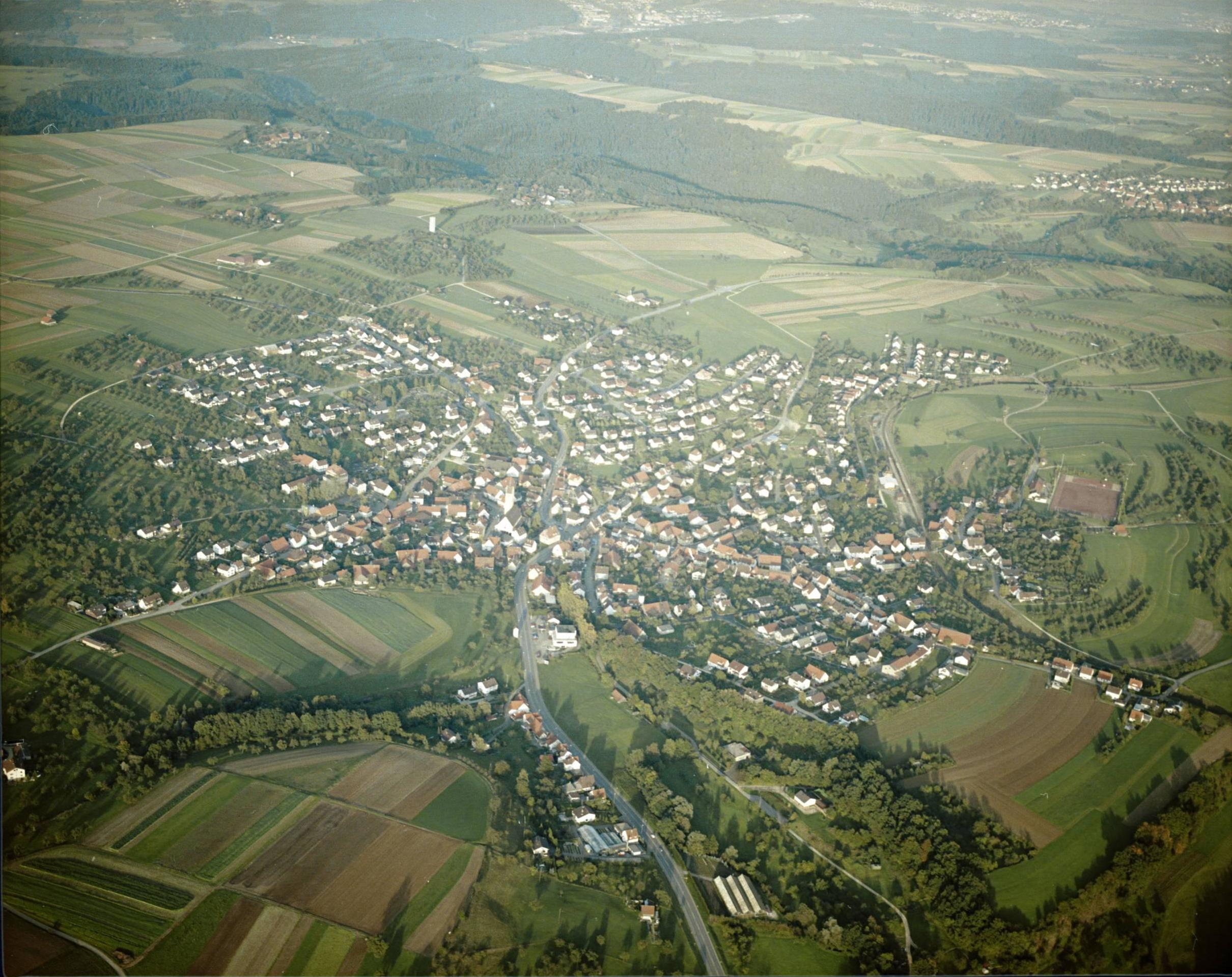 Luftbild von Wäschenbeuren - Staatsarchiv Sigmaringen - Archivalieneinheit N 1/96 T 1 Nr. 867